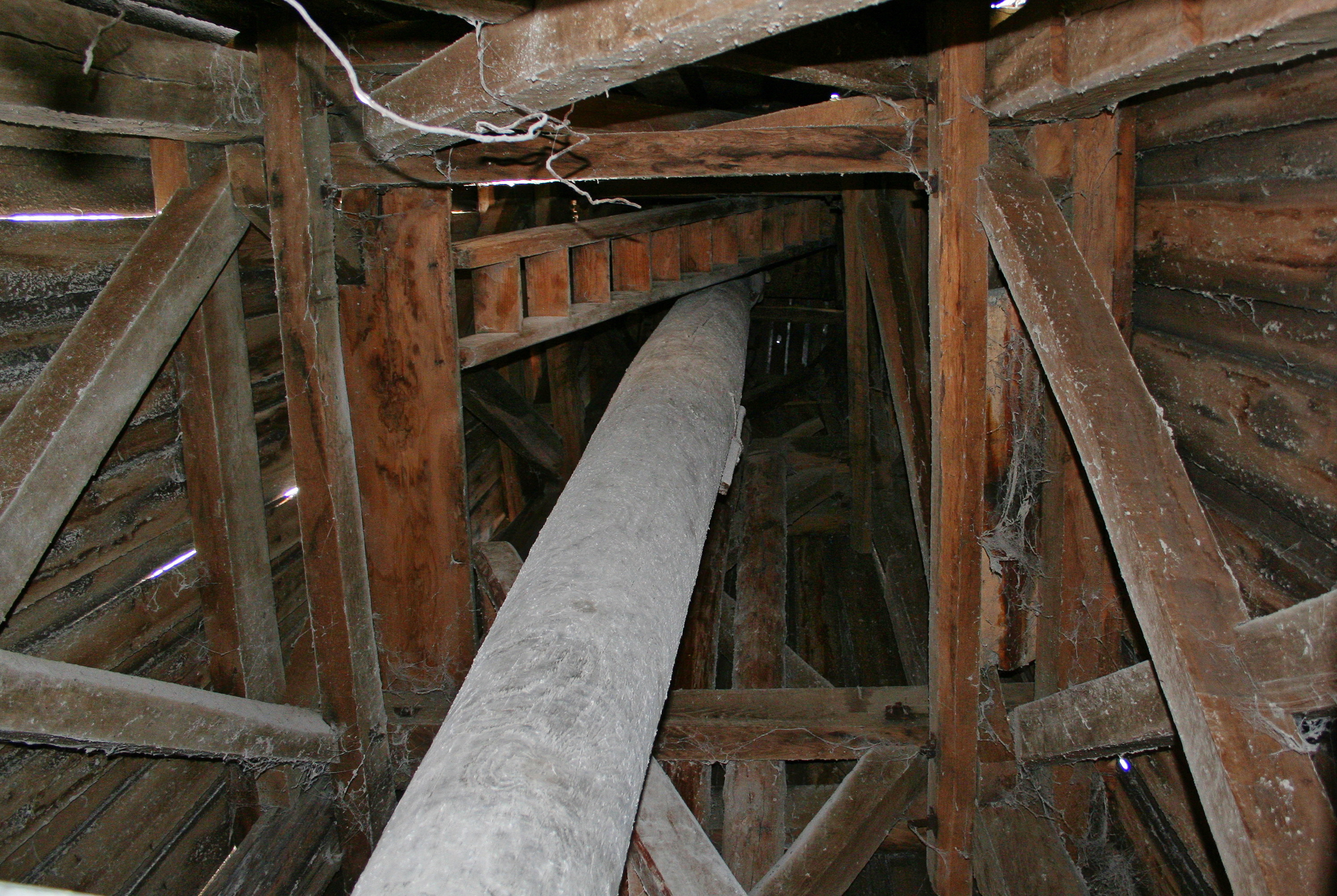 Вітряк, Прохорівка